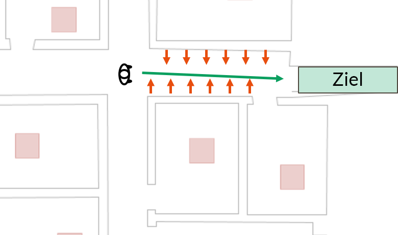 floor plan crowd simulation: rejection from walls